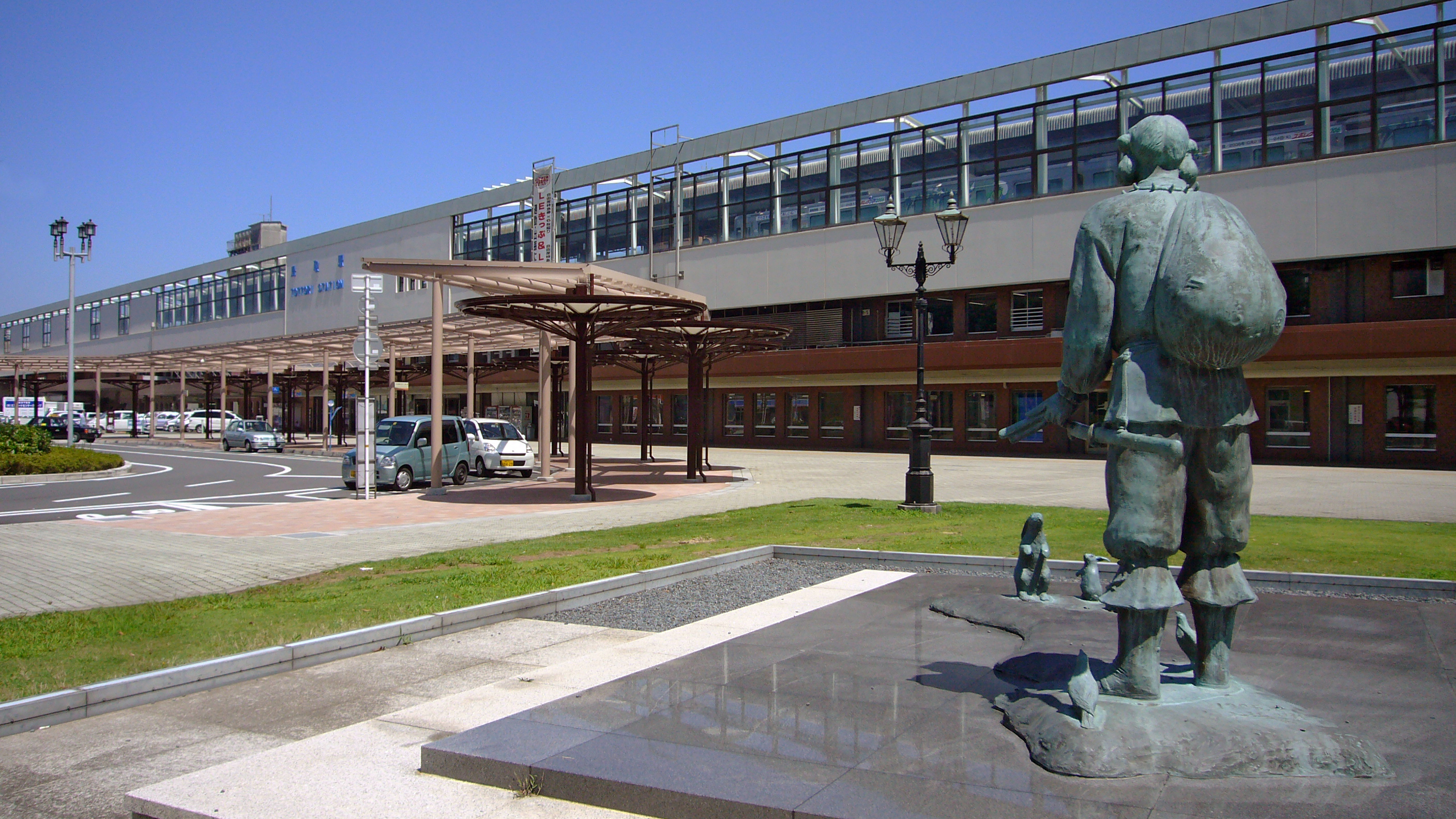 Tottori Station in Tottori, Tottori prefecture, Japan